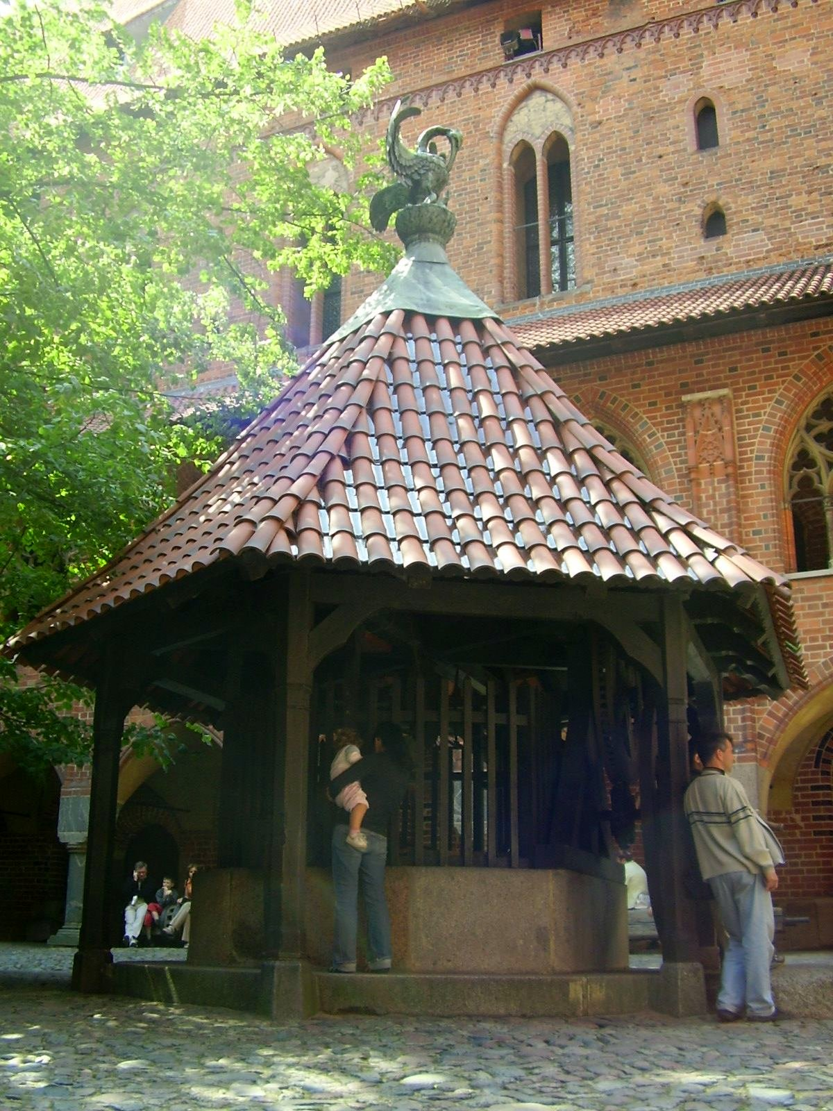 jedna ze studni na zamku w malborku